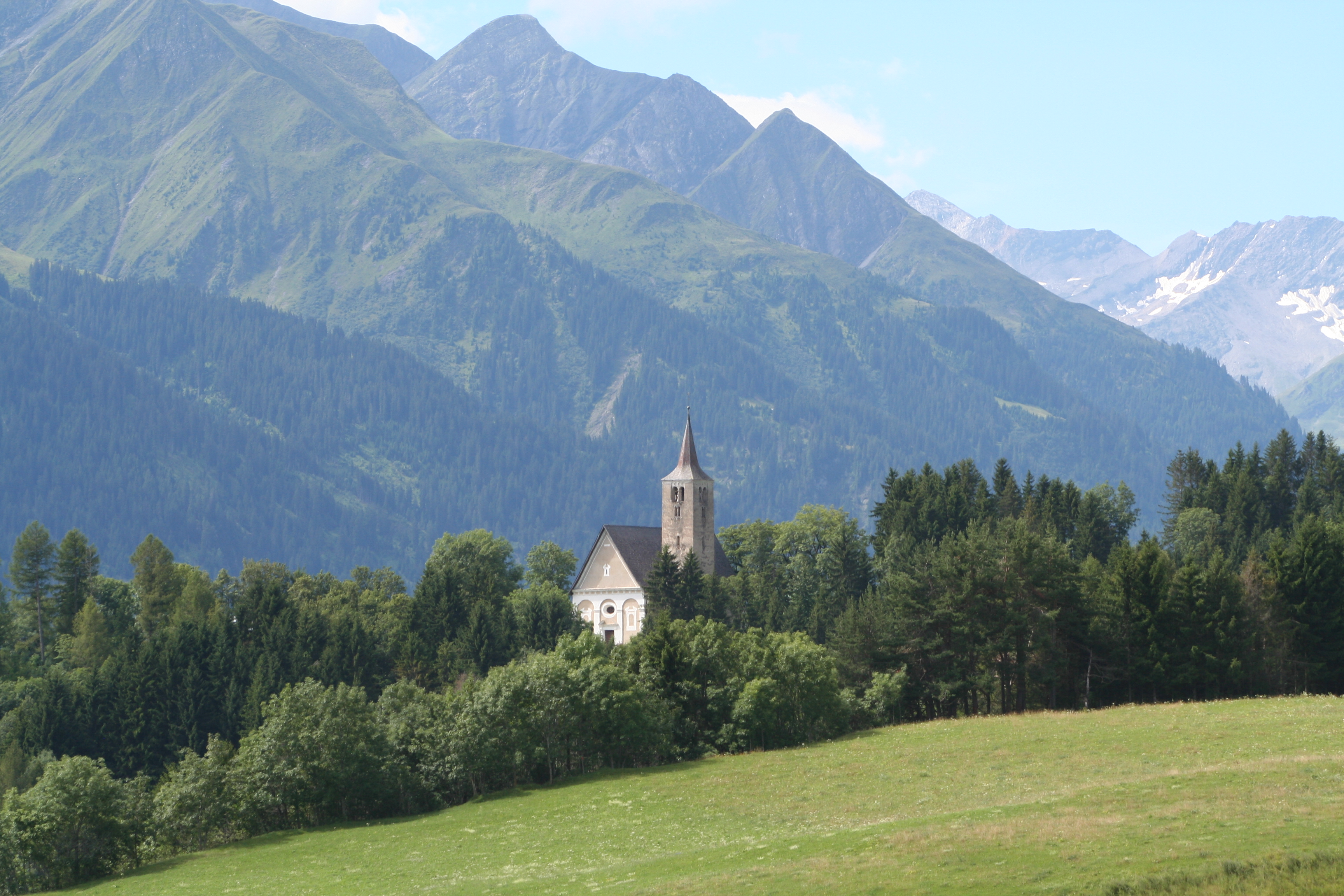 Katholische Kirche Pleif: Ansicht von Osten